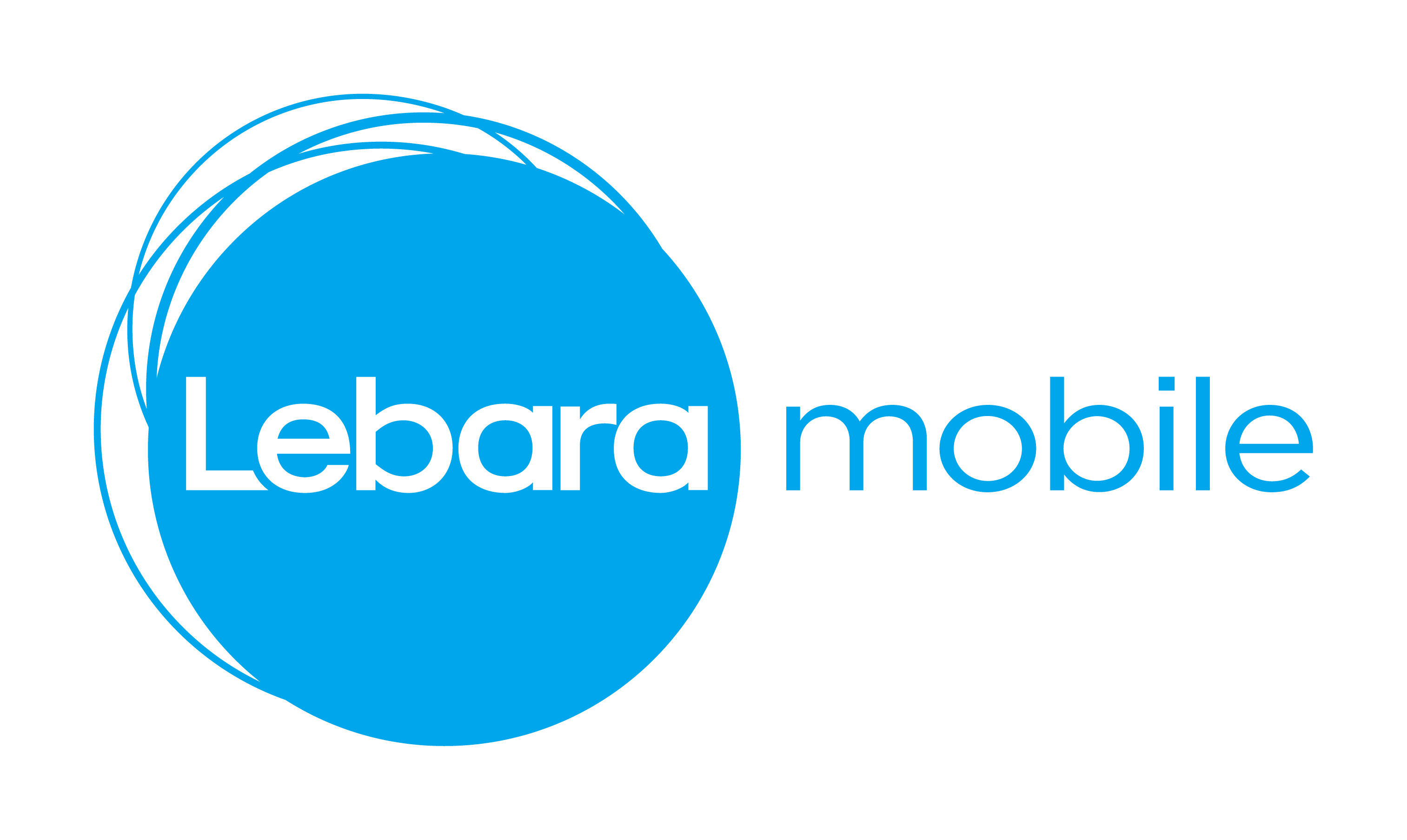 Lebara Mobile Logo